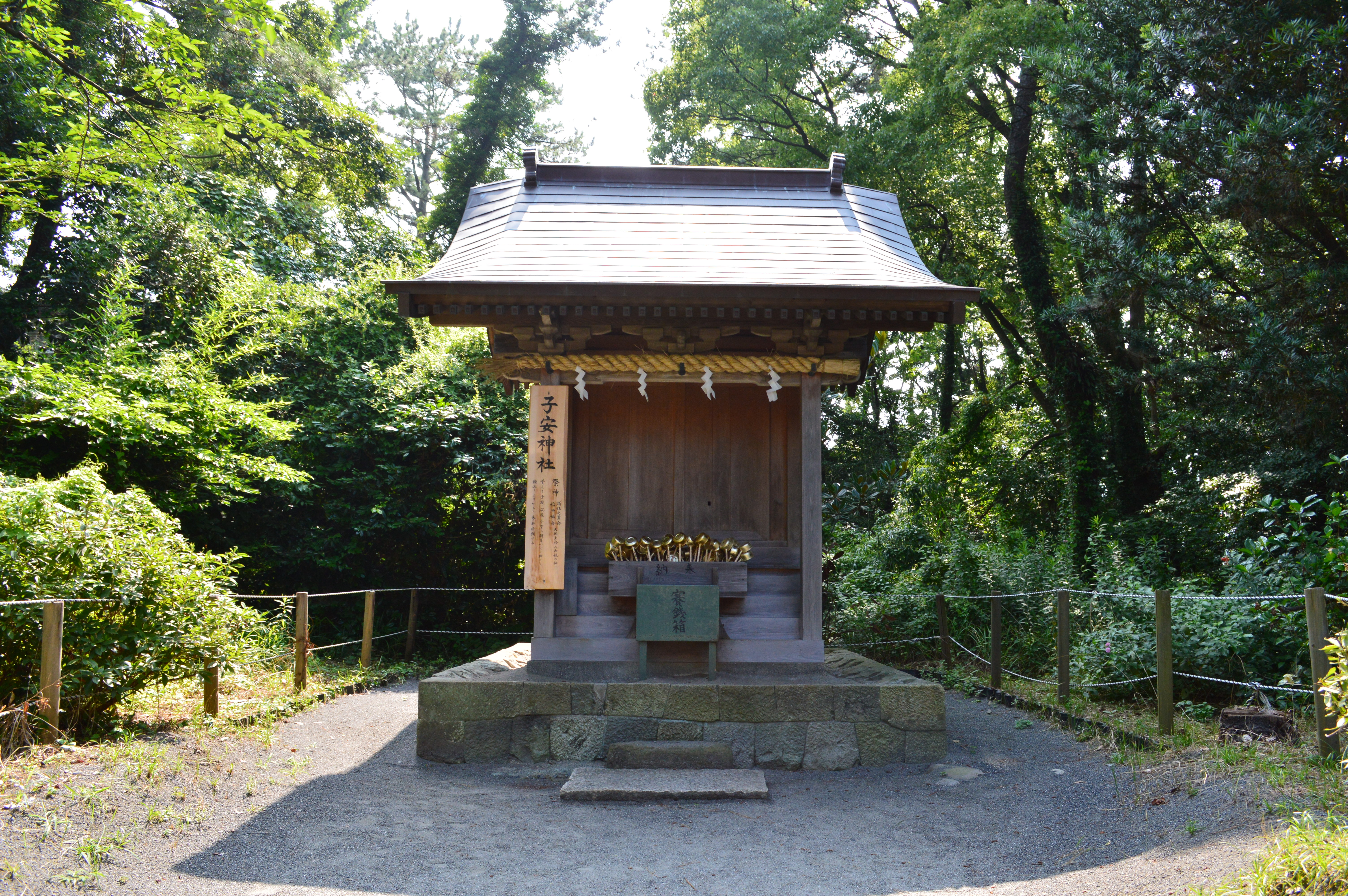 御穂神社 境内子安神社